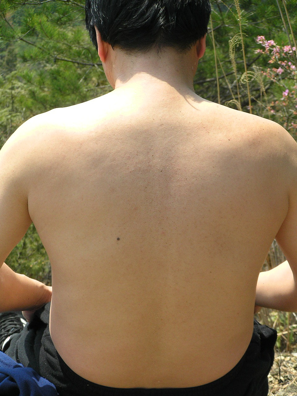 男の背中